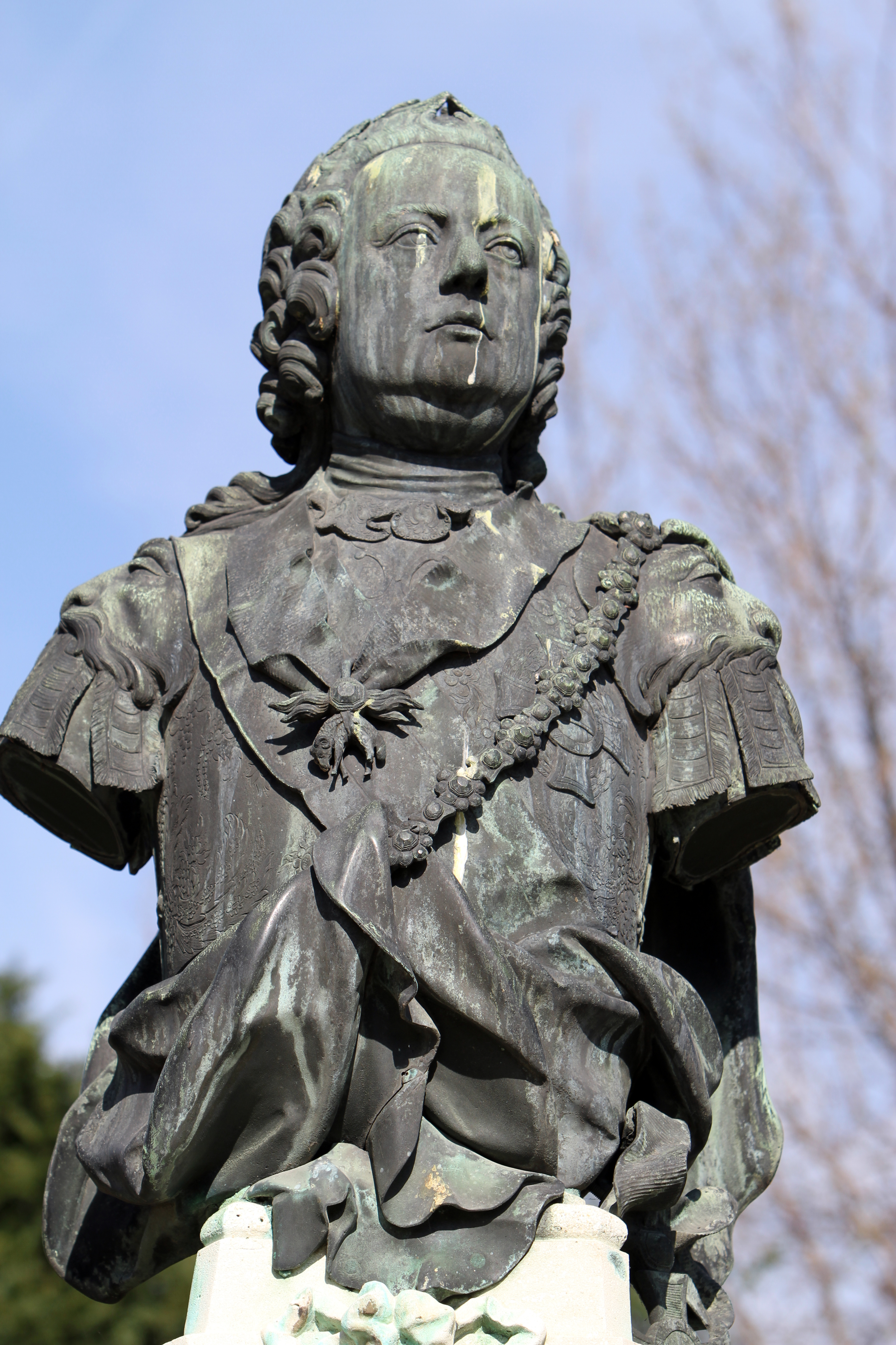 Kaiser Franz I. Stephan von Lothringen